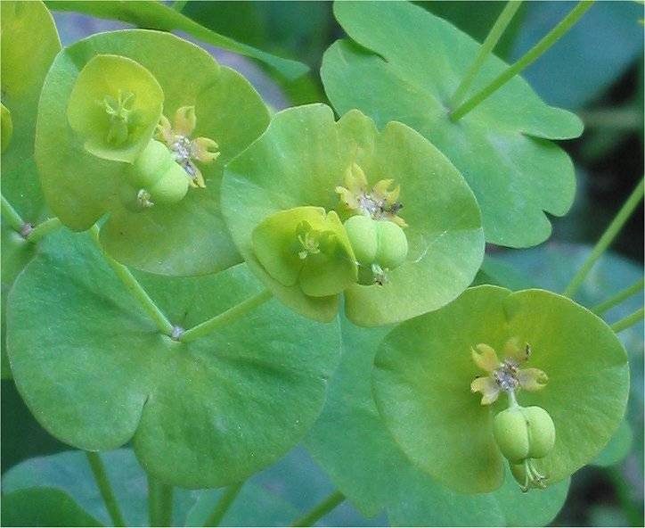 Amandelwolfsmelk (Euphorbia amygdaloides)